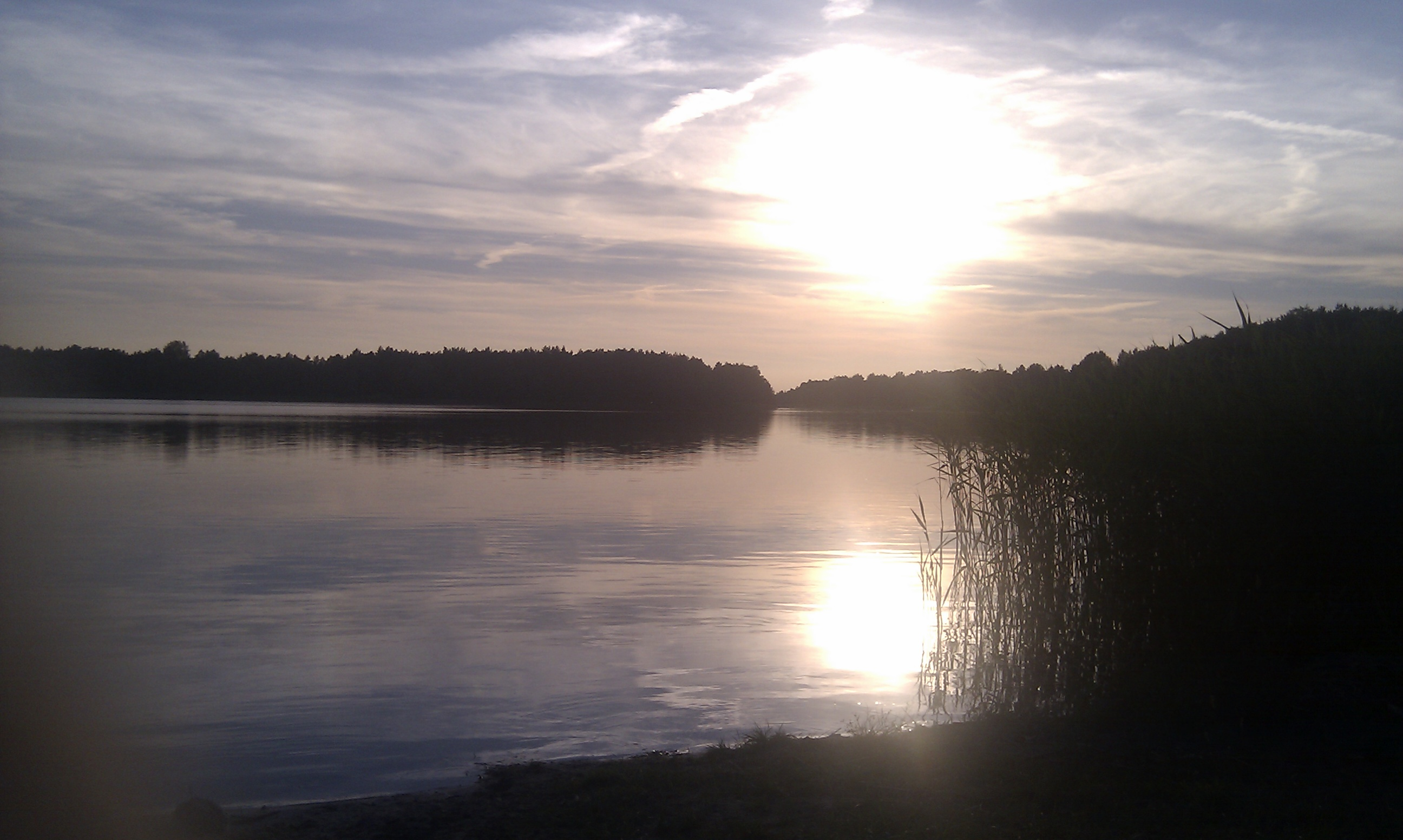 Katjasee mit Blick auf Mündung zur Helenesee